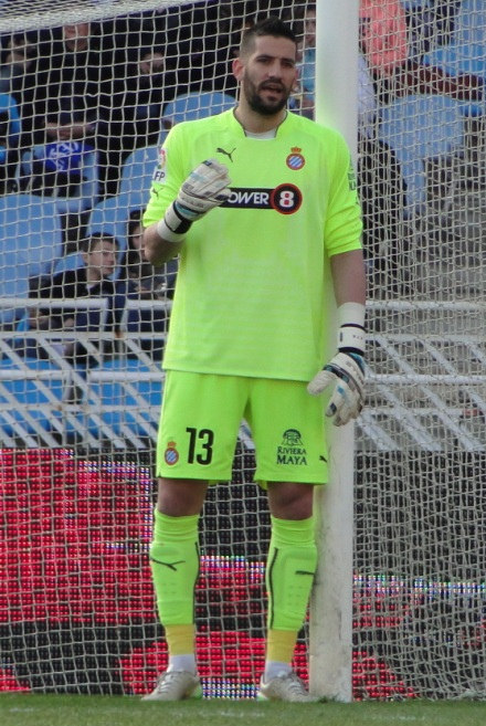 Kiko Casilla playing for RCD Espanyol in 2015